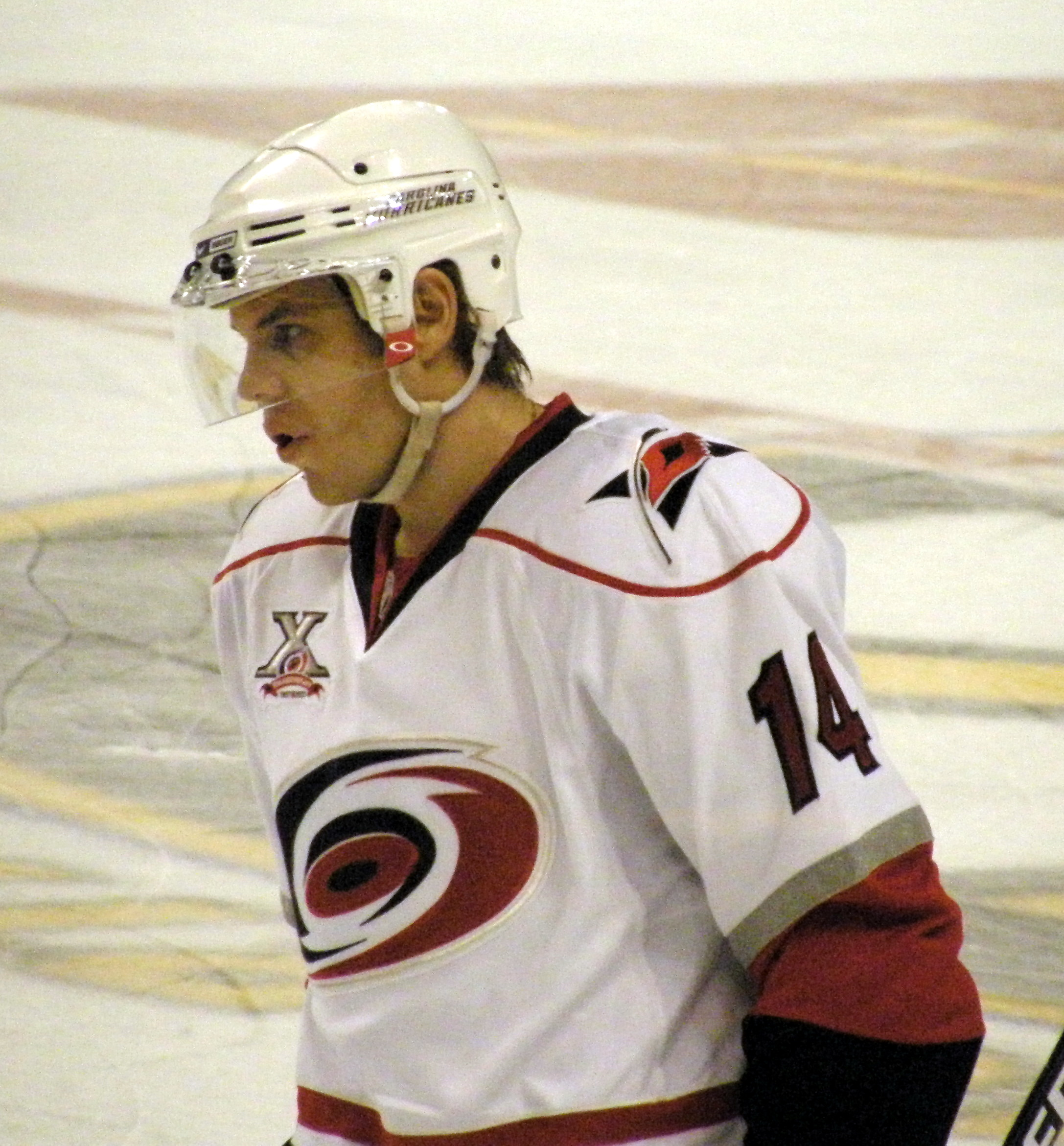 #14 Sergei Samsonov (LW), Carolina Hurricanes